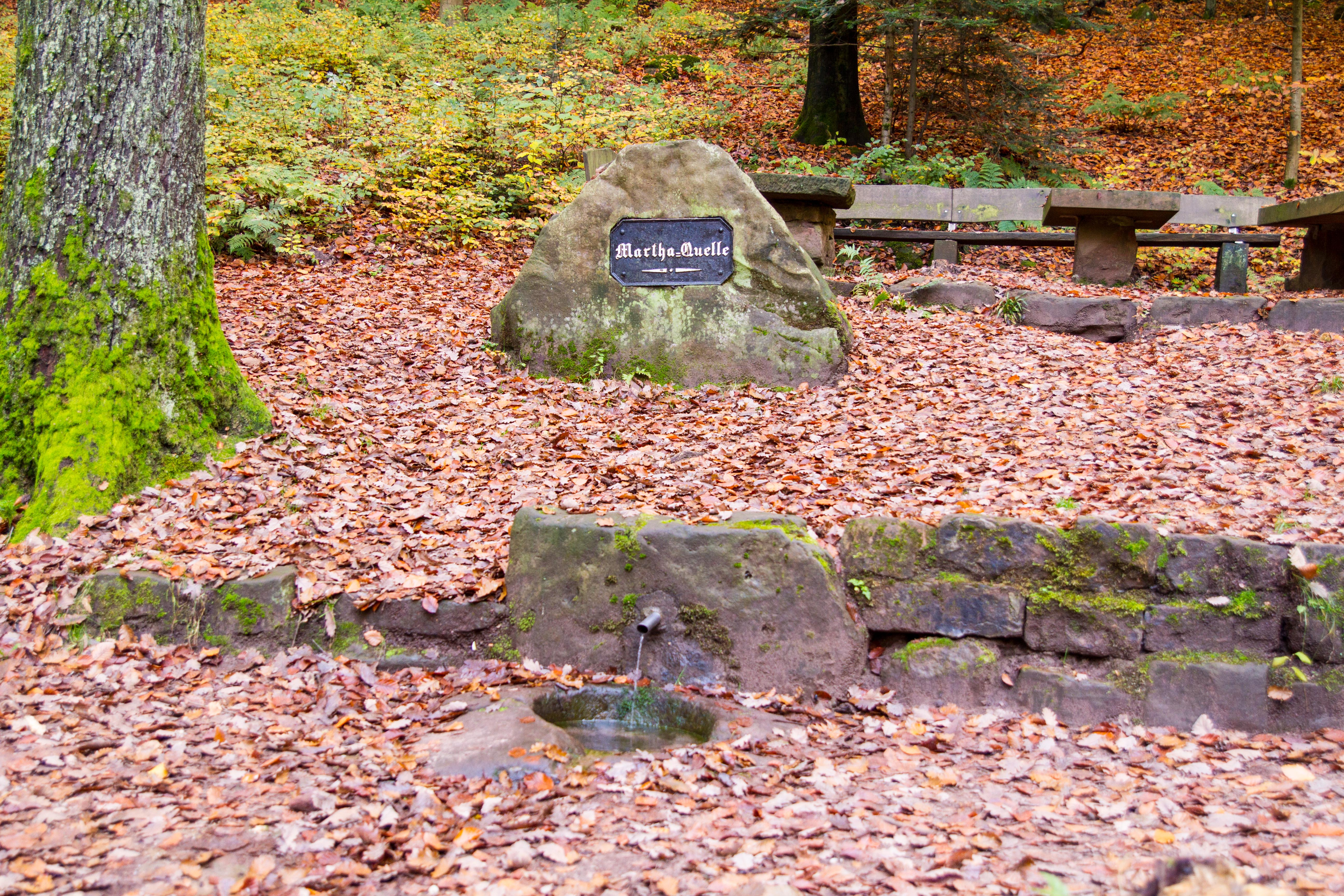 Die Martha-Quelle bei Klingenmünster.